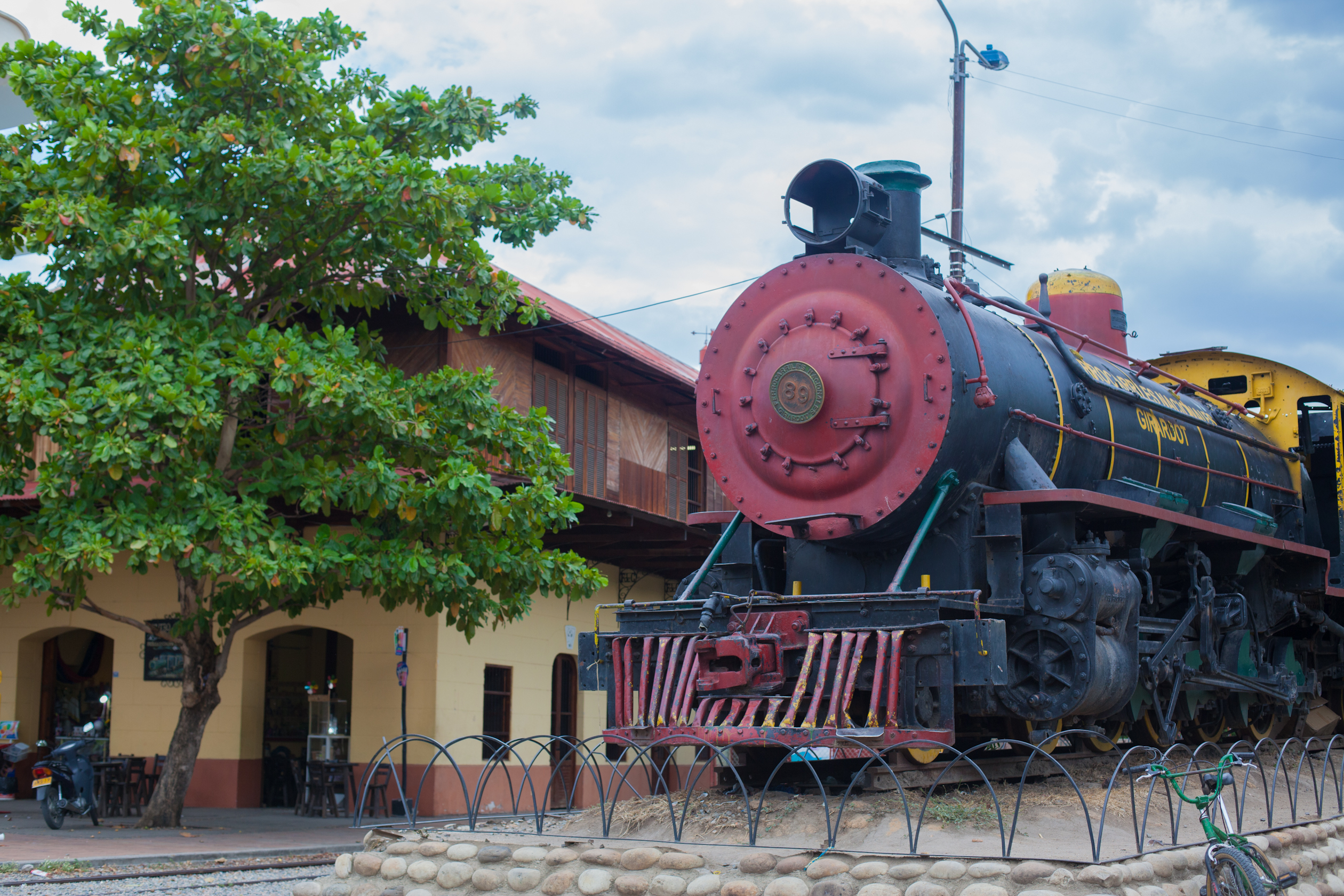 Estación del Ferrocarril Girardot